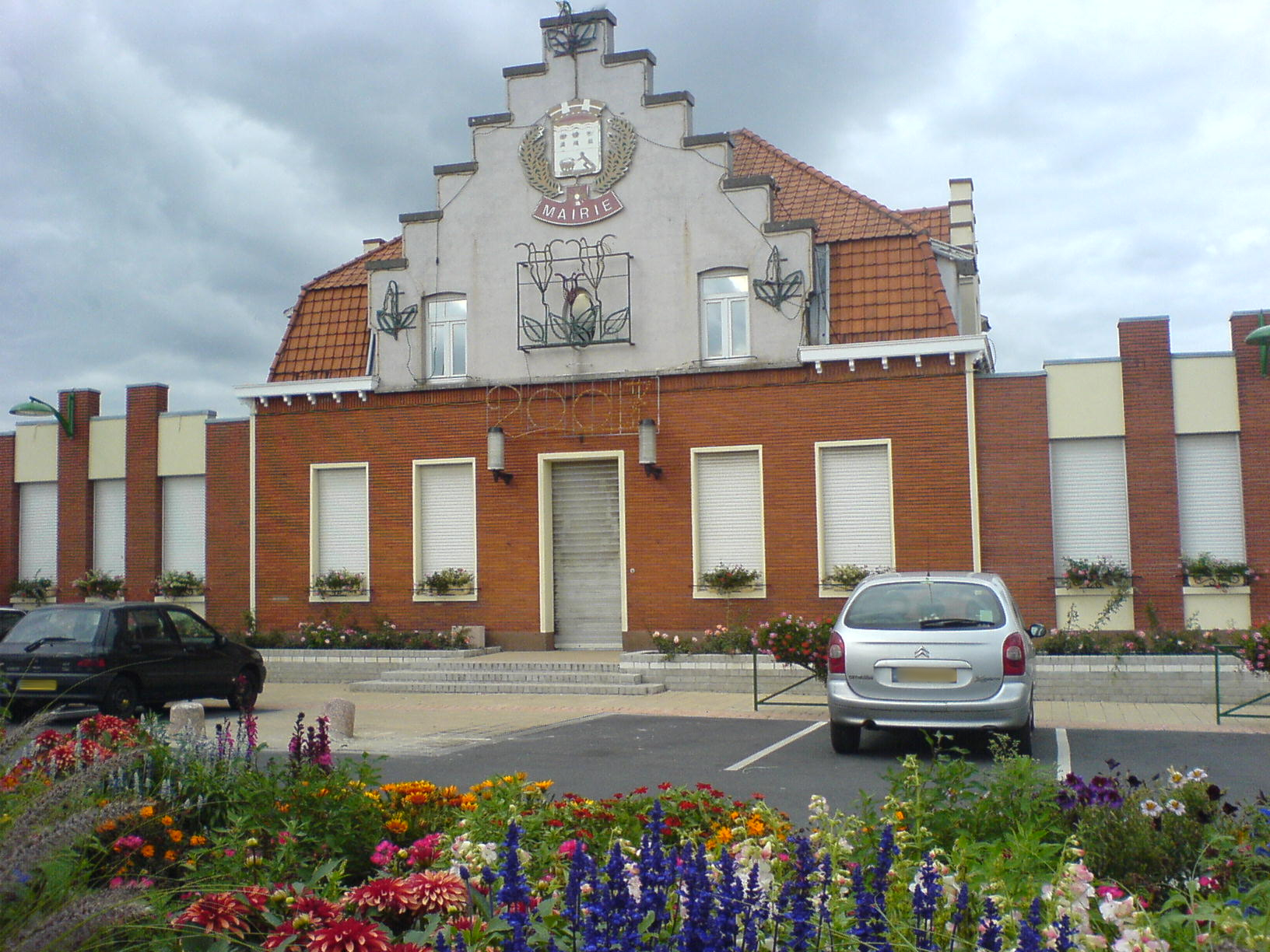 Haisnes, Pas de Calais, France: la mairie